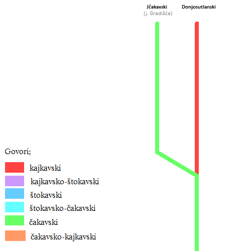 Razvitak i seobe govora Donjeg Pounja